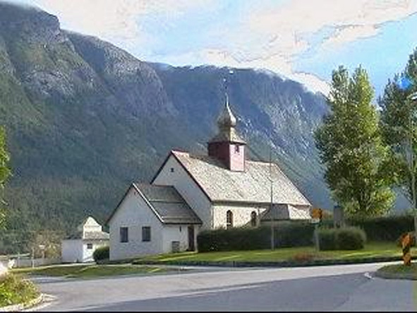 Hen church, Isfjorden, in Norway